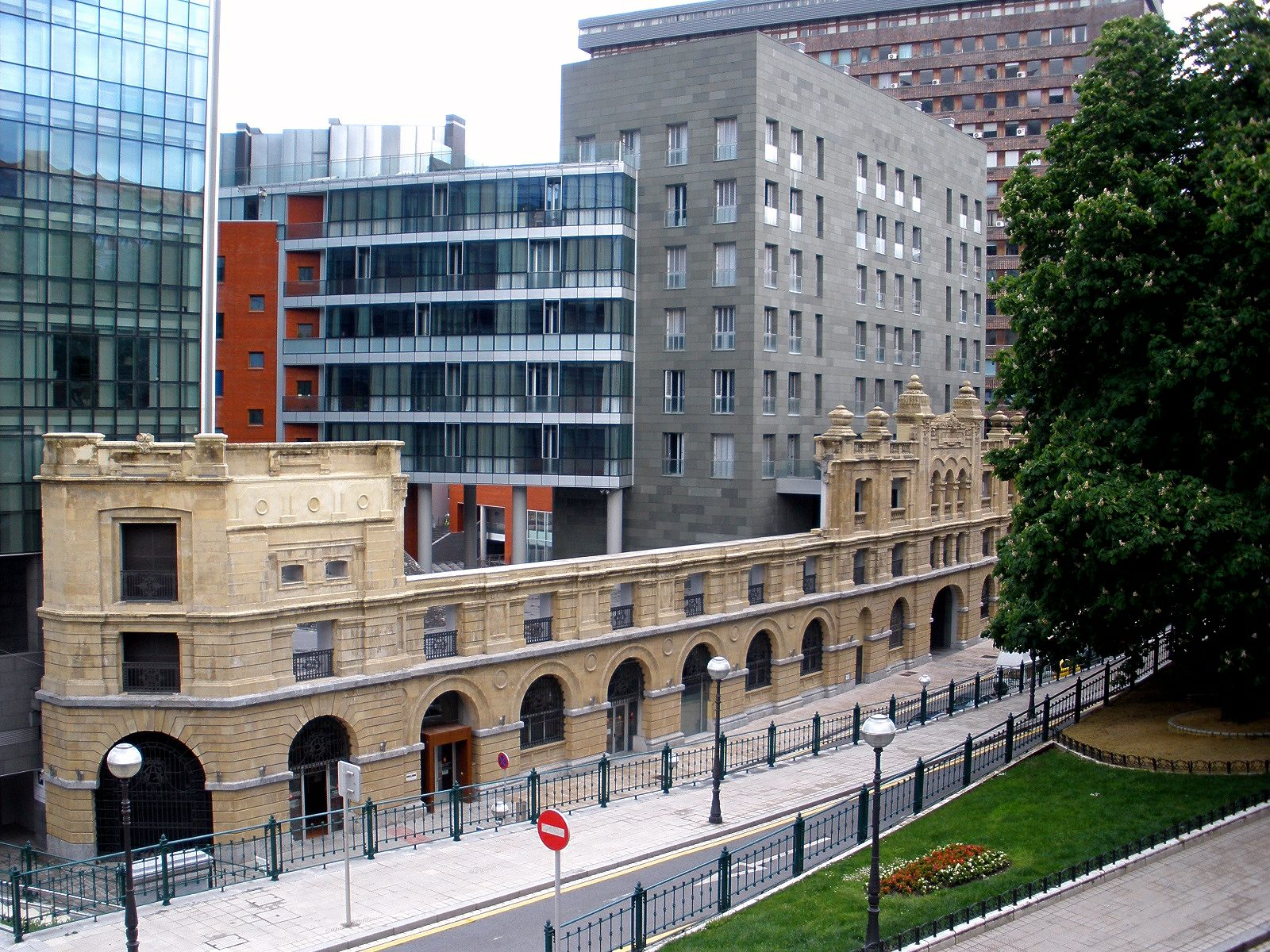 Calle Uribitarte, Bilbao (País Vasco, España).